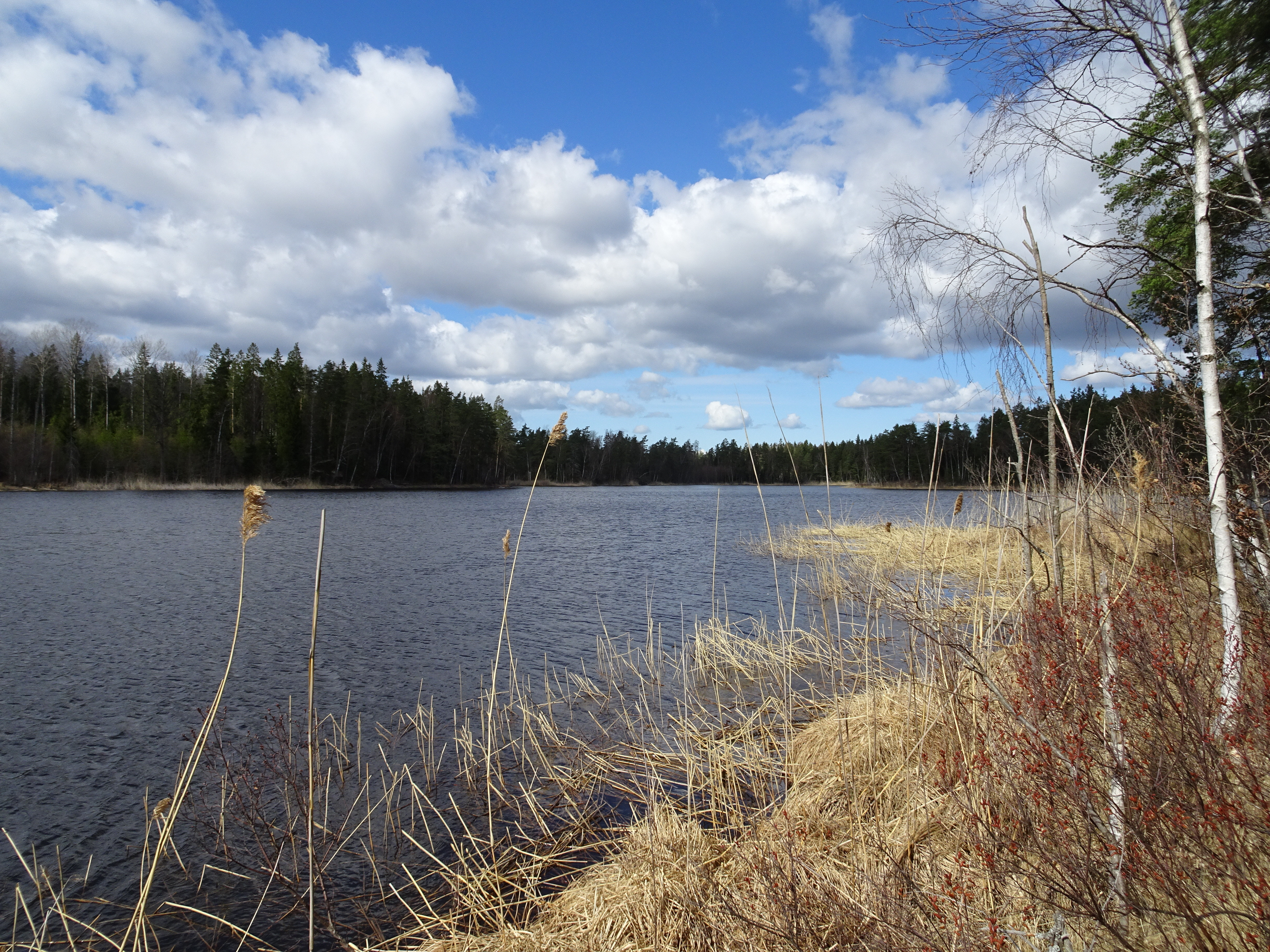 Vackstaskogens naturreservat, Långsjön